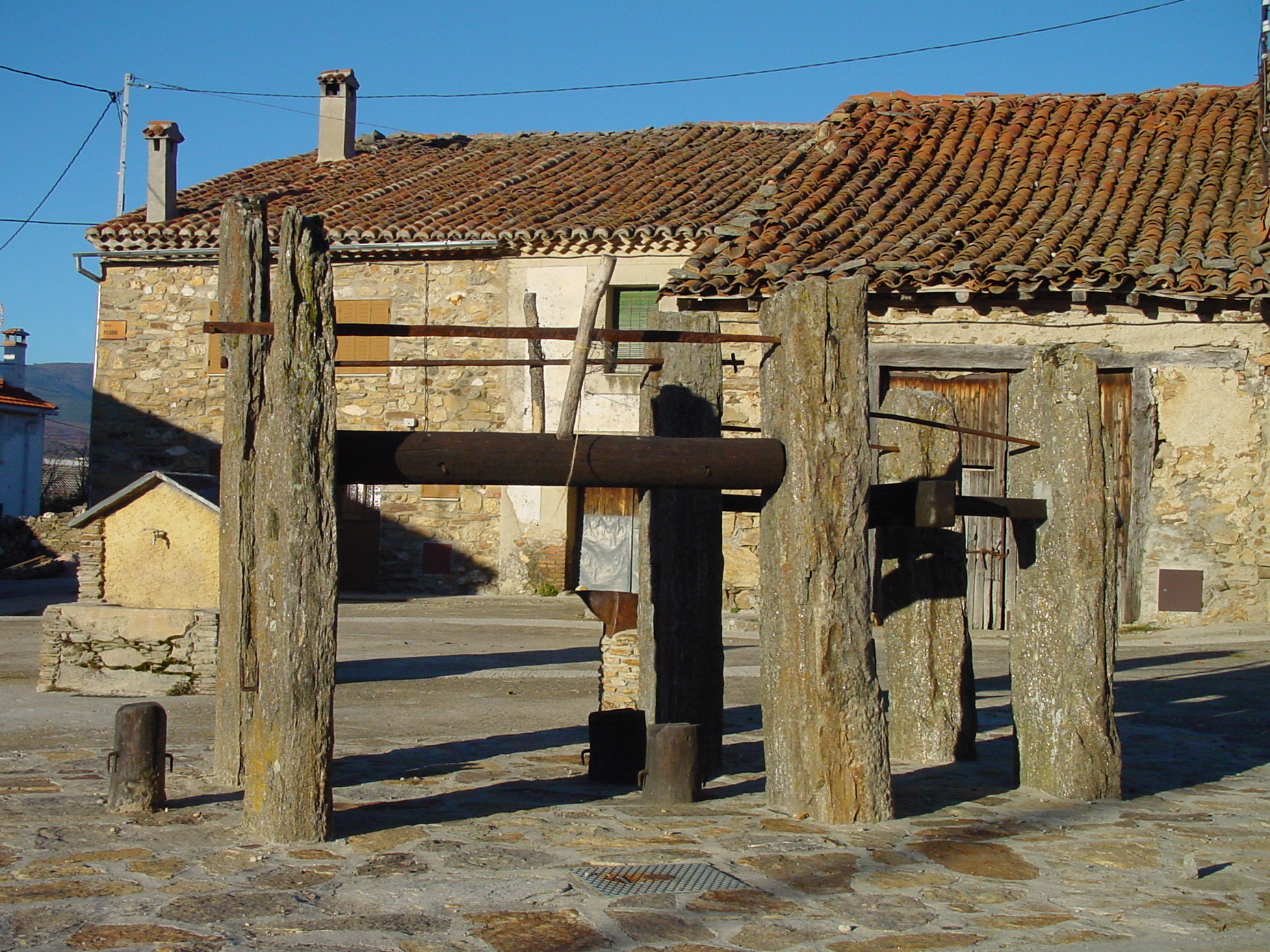 Potro en Prádena del Rincón.